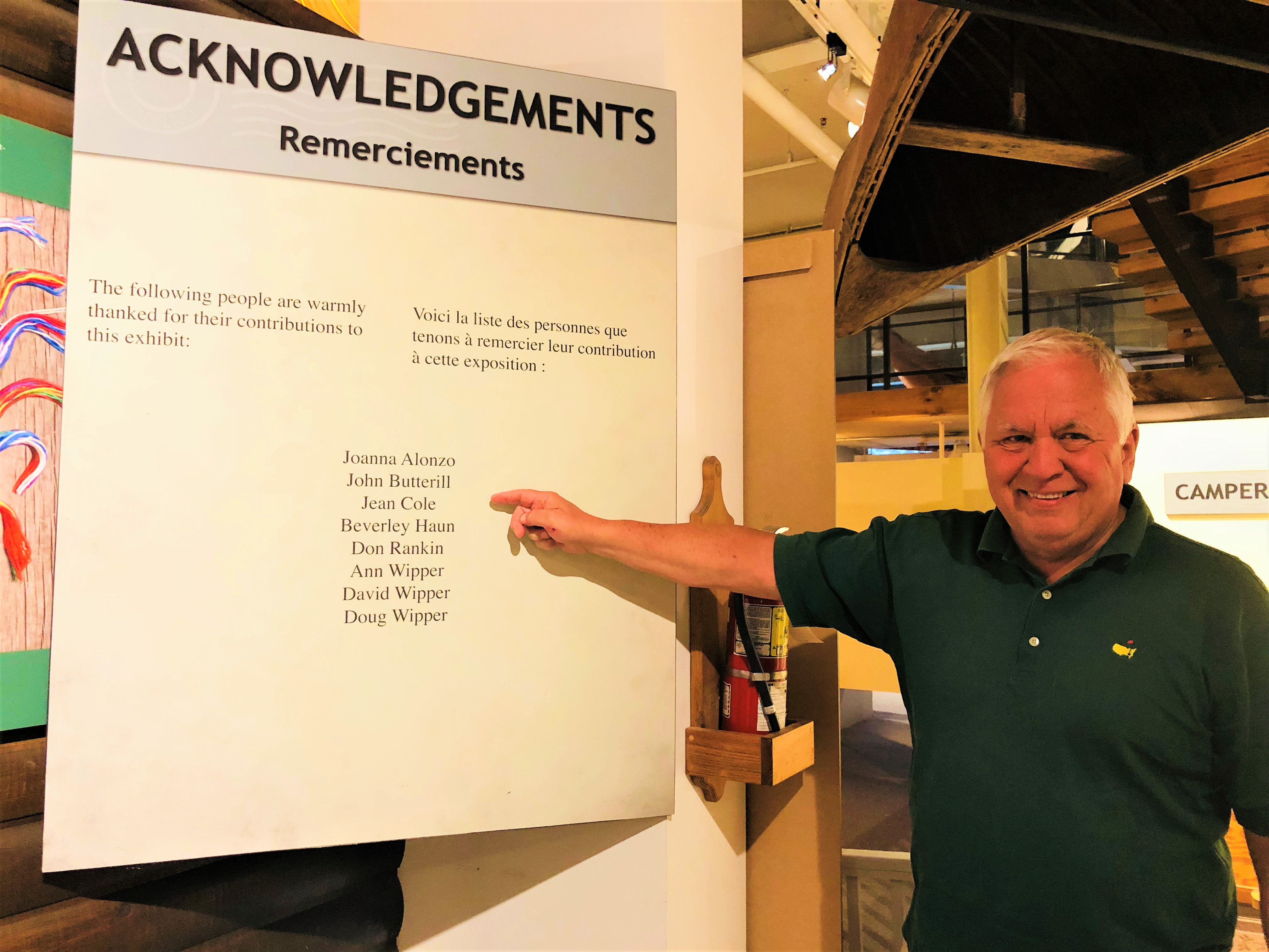 創立に貢献した人名のなかに「John Butterill」がある